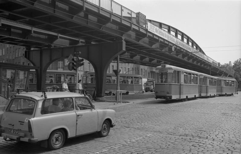 22.7.1991 Berlin-Prenzlauer Berg, Schönhauser Allee